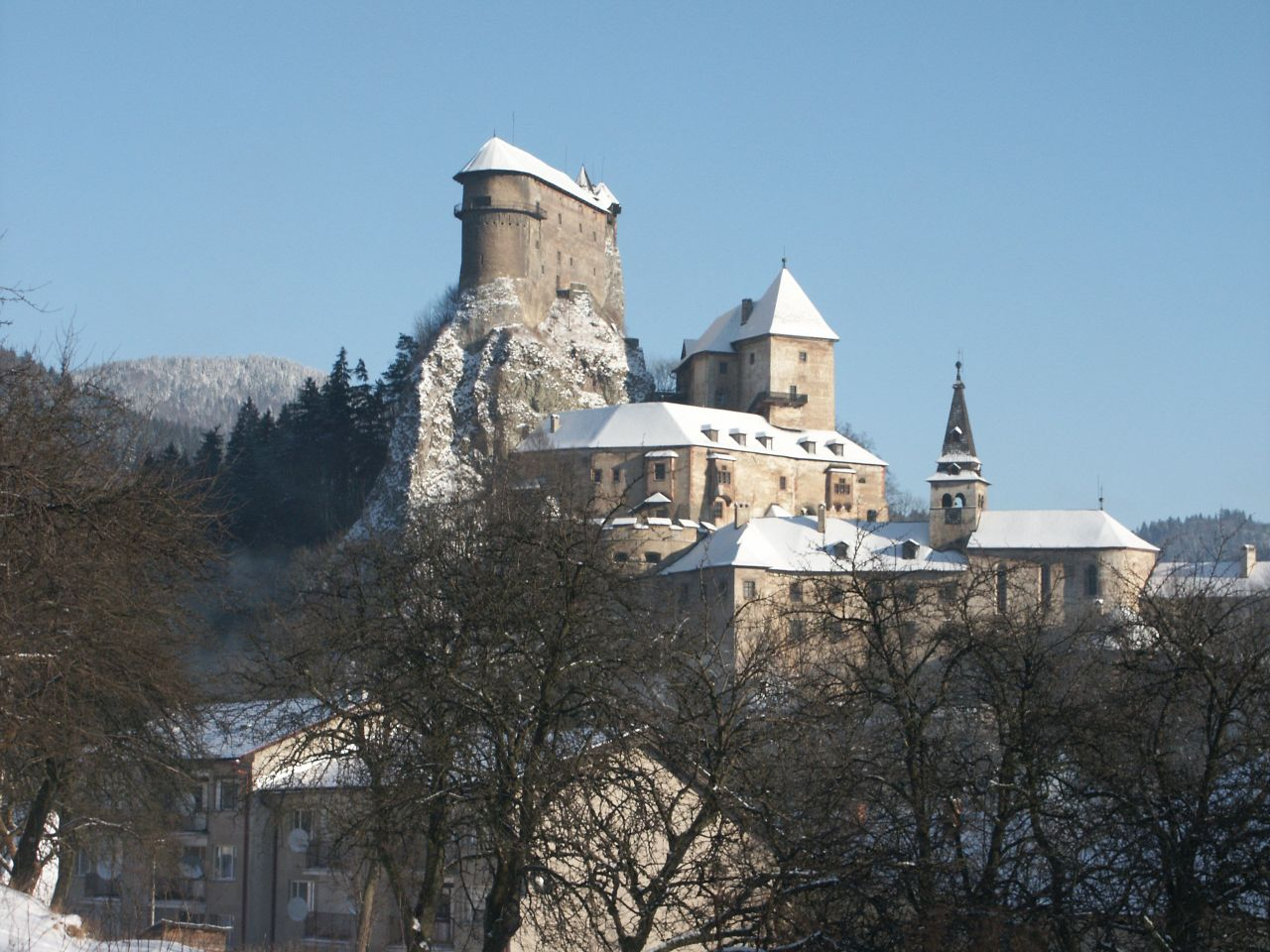 A castle in Slovakia.